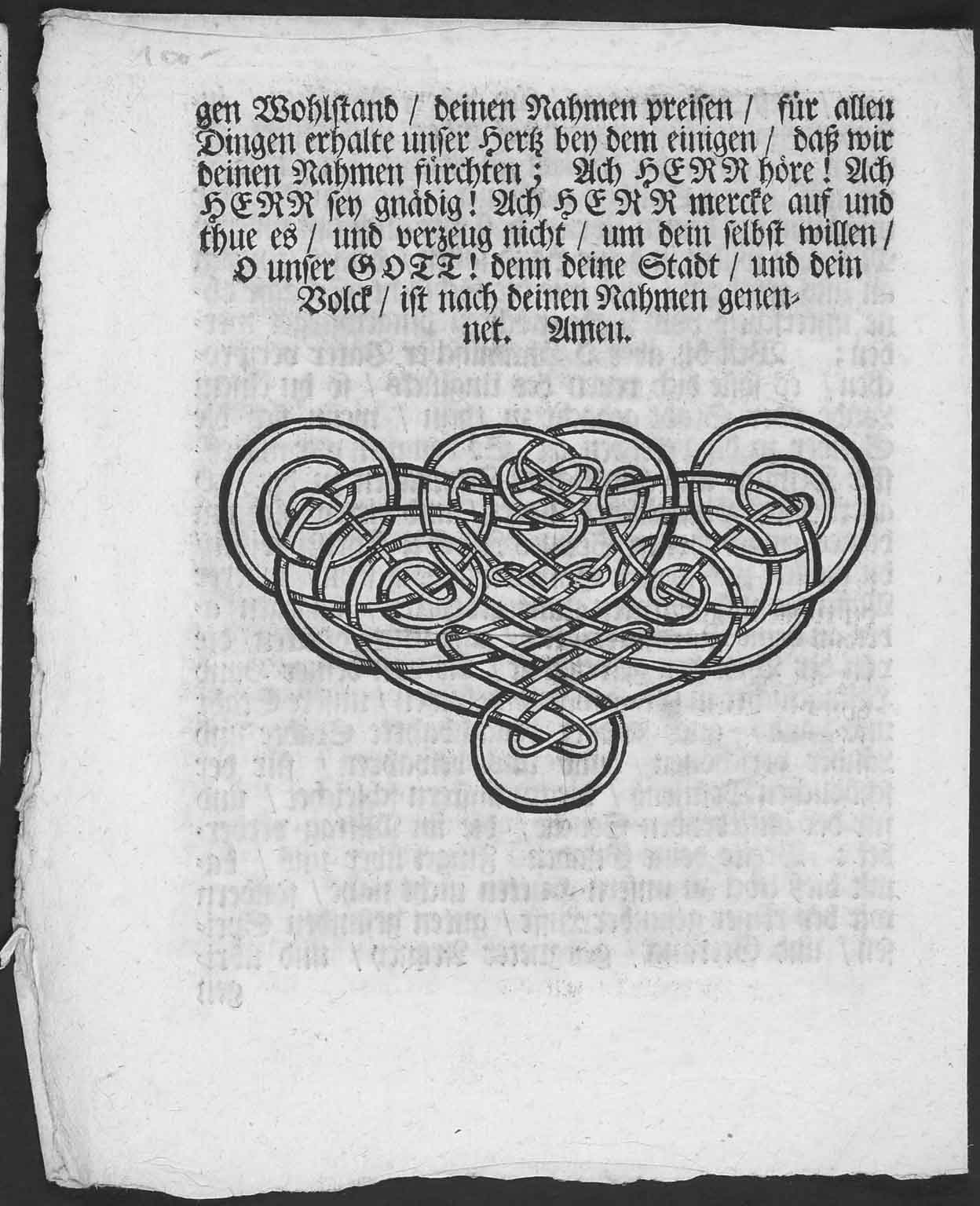 Gebeht um Abwendung der Contagion, Hamburg: Neumann, ca 1700